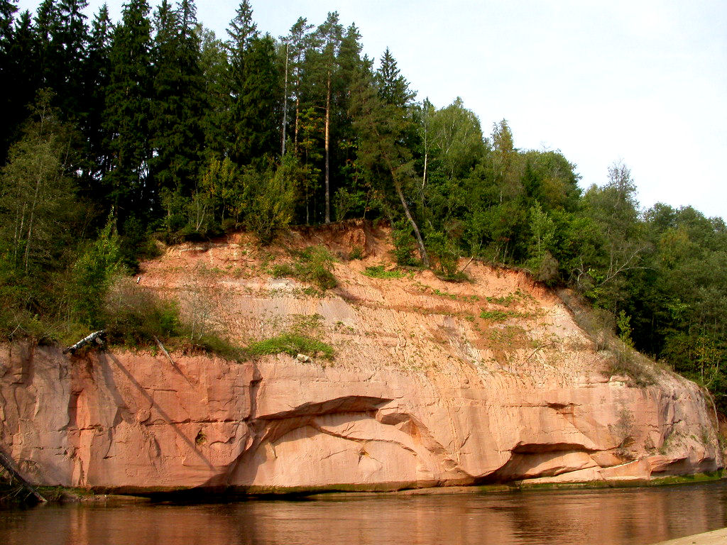 Gaujas Ķūķu klintis. (Ievas Upenieces foto)